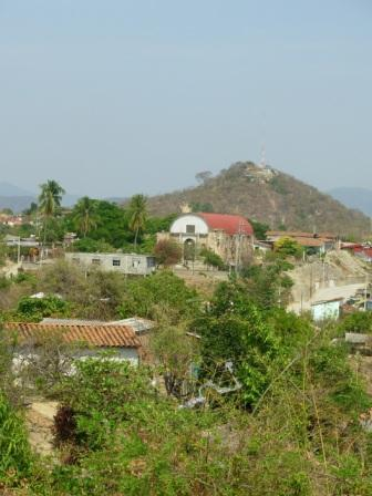 De kerk van Tututepec met op de achtergrond de berg Yuku Saa waarnaar het dorp is genoemd./The church of Tututepec with on the background the hill Yuku Saa.